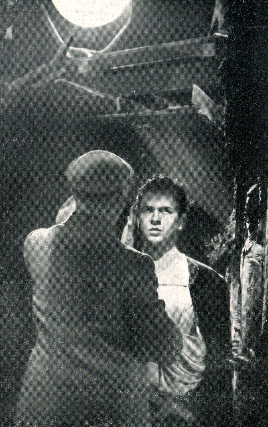 Alessandro Blasetti e Gino Cervi sul set di "Ettore Fieramosca" (Blasetti, 1938)